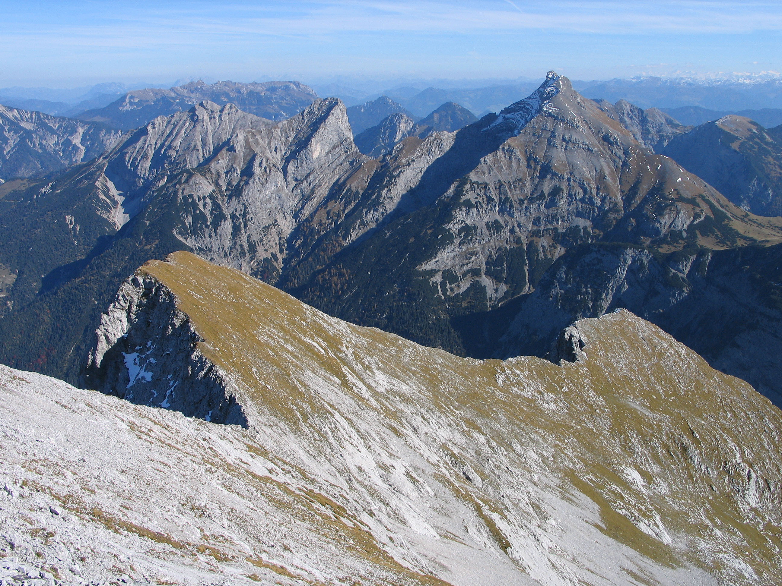 Sonnjochgruppe, Karwendel, vom Gamsjoch. v.r.n.l. Sonnjoch (2457m), Bärlahnersattel (1994m), Schaufelspitze (2306m), Bettlerkarspitze (2268m)